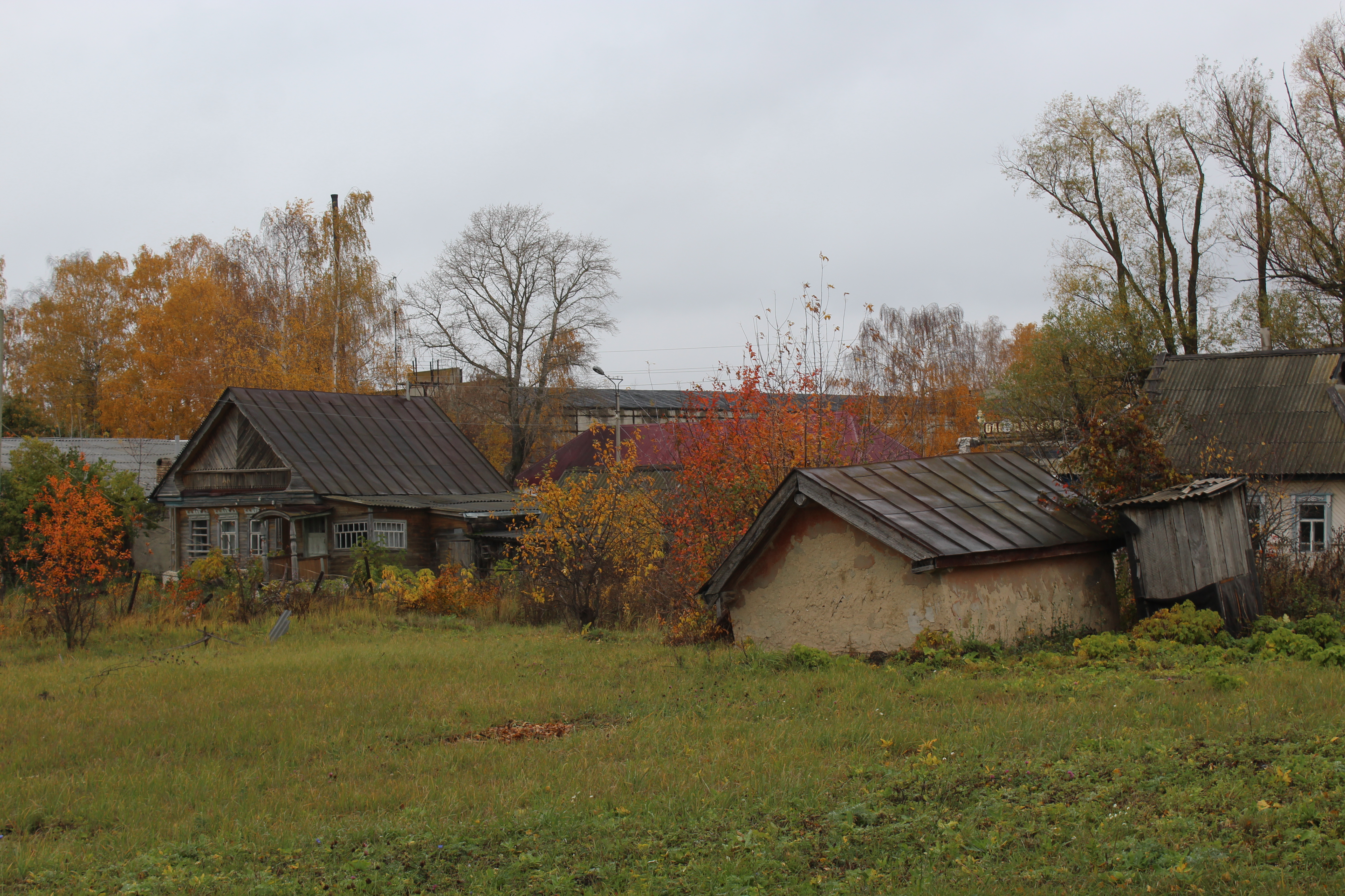 Старые деревянные дома и деревья осенью.